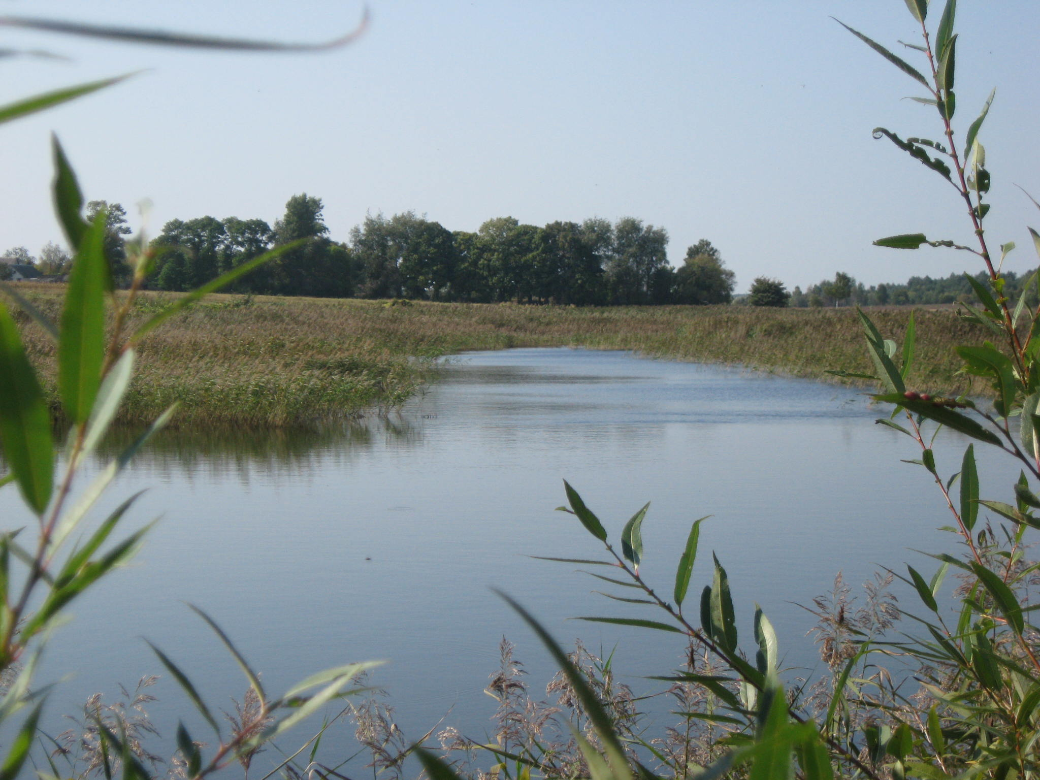 Рибний ставок